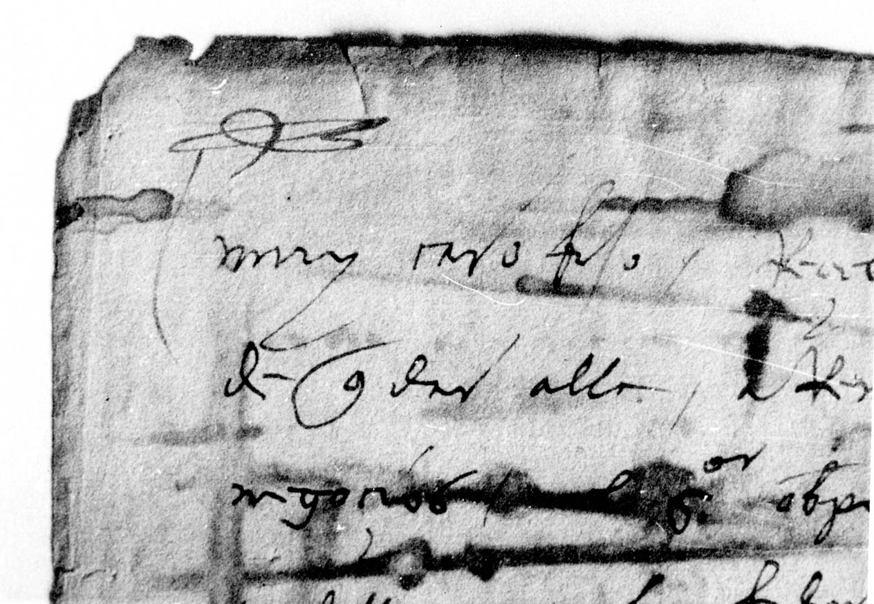 Detall carta de Colom al seu fill Diego, amb les lletres Bet i hai de l'alfabet hebreu